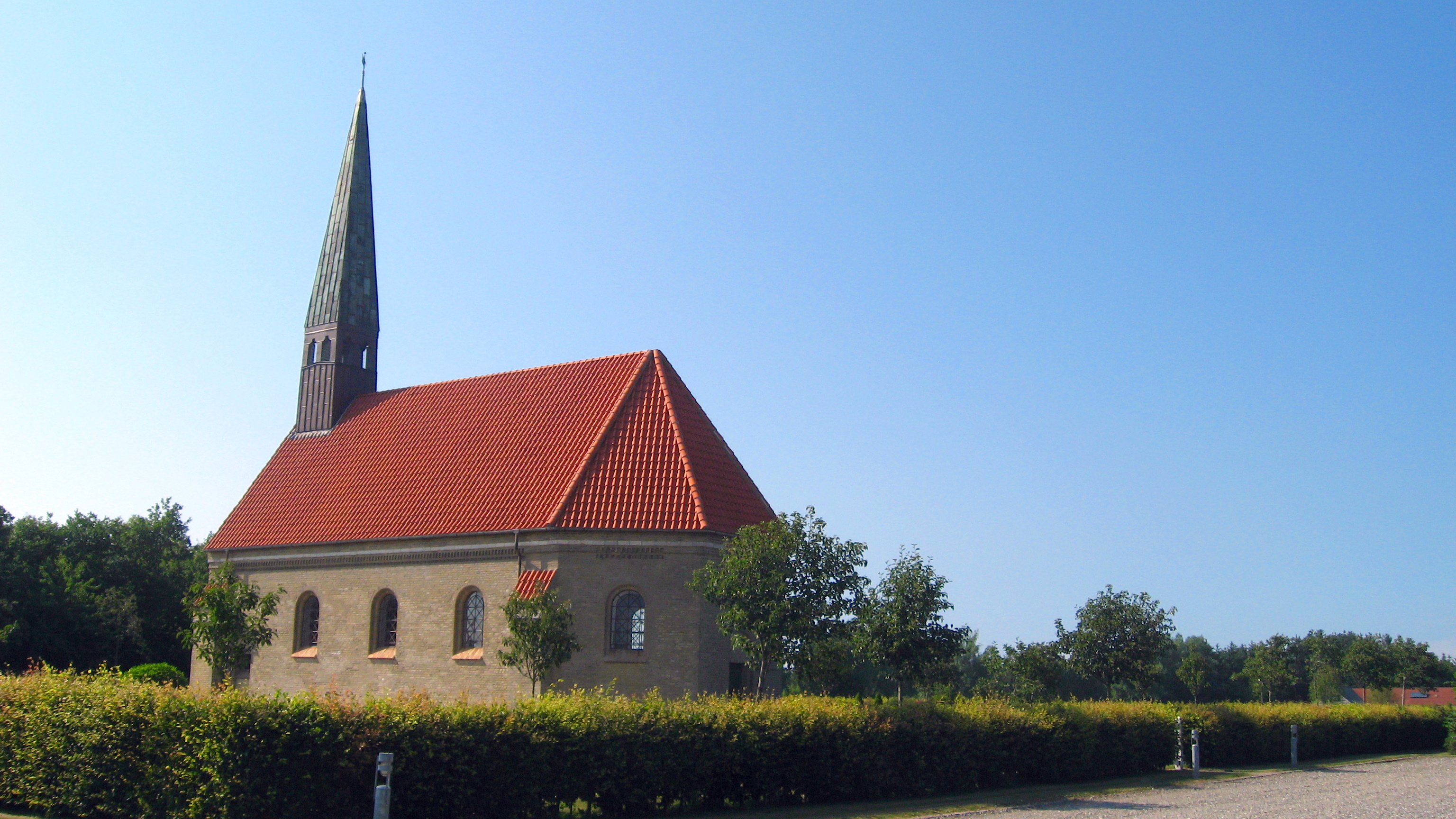 Koldmose Kirke, Jammerbugt Kommune (tidl. Brovst Kommune)